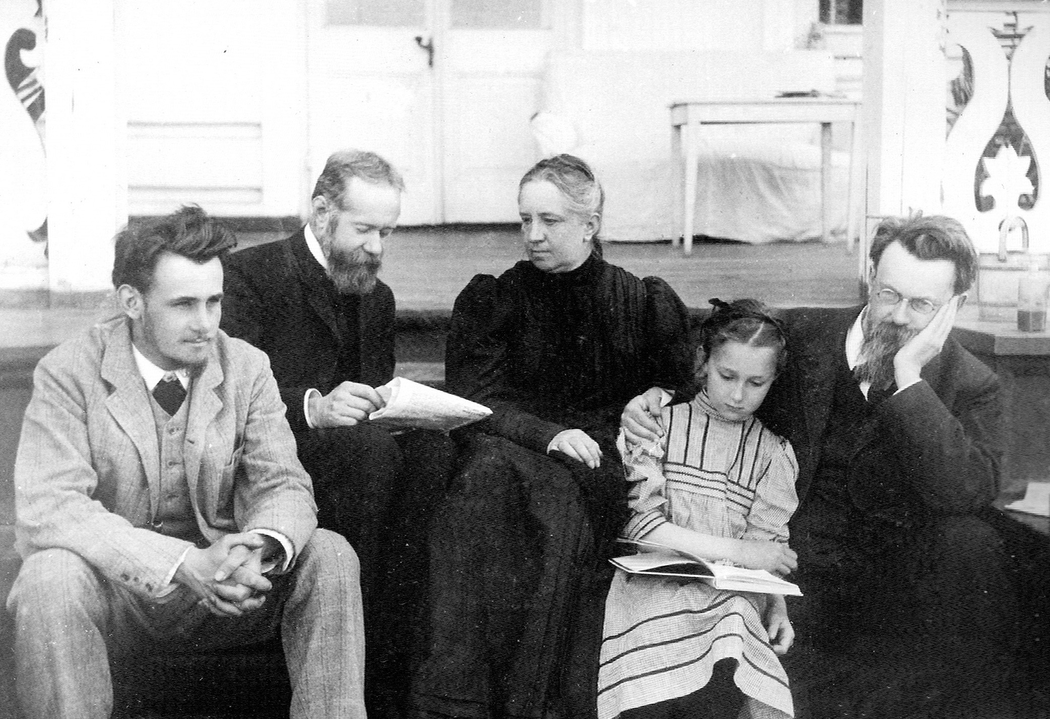 Семья Вернадских. Справа налево - Владимир Иванович Вернадский, дочь Нина, жена Наталья Егоровна, ее брат Павел Егорович Старицкий и сын Георгий (Vernadsky family in Poltava. Right-left: Vladimir, his daughter Nina, wife Natalia, her brother Pavel Staritsky, son George)